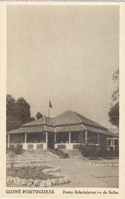 Neogravura - Guiné Portuguesa - Posto Administrativo de Safim